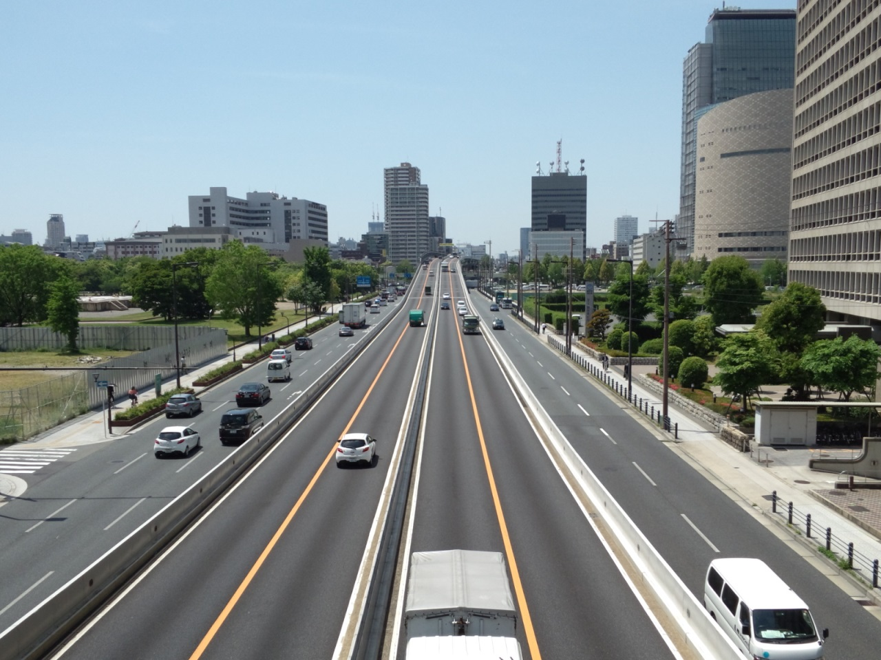 中央大通・宮跡歩道橋より